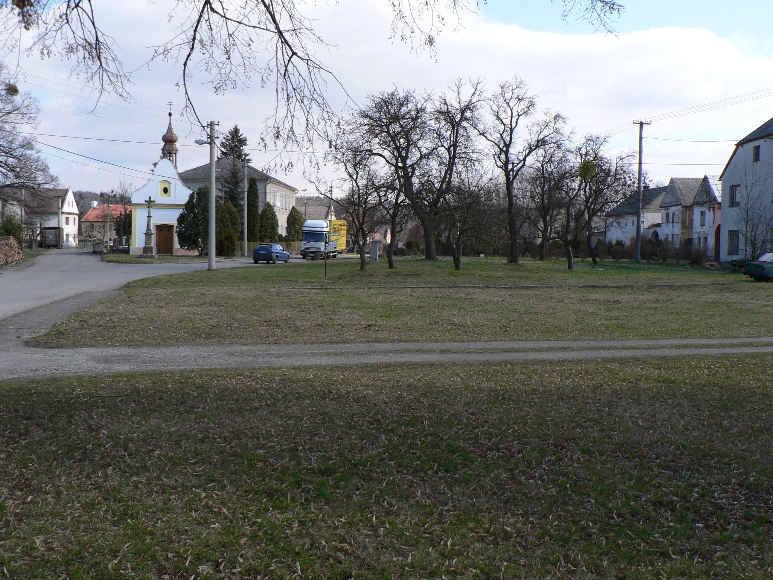 Náves v Doubravici, okres Šumperk